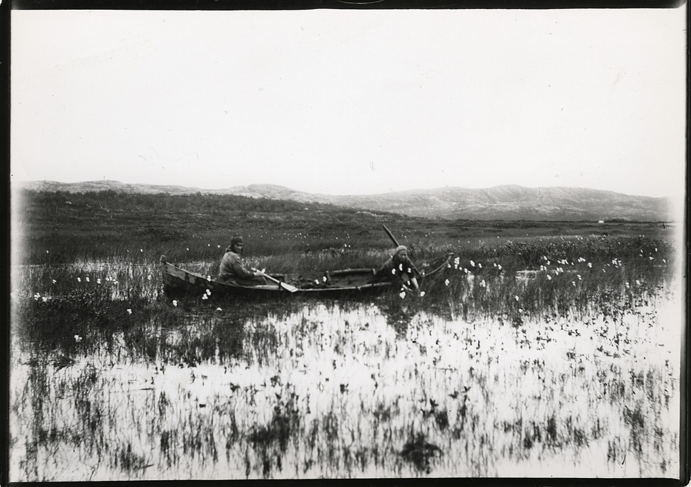 Wessel, Ellisif Rannveig To mennesker i en båt. Ved 1ste K.vand. Senegres høstes. NMFF.002113